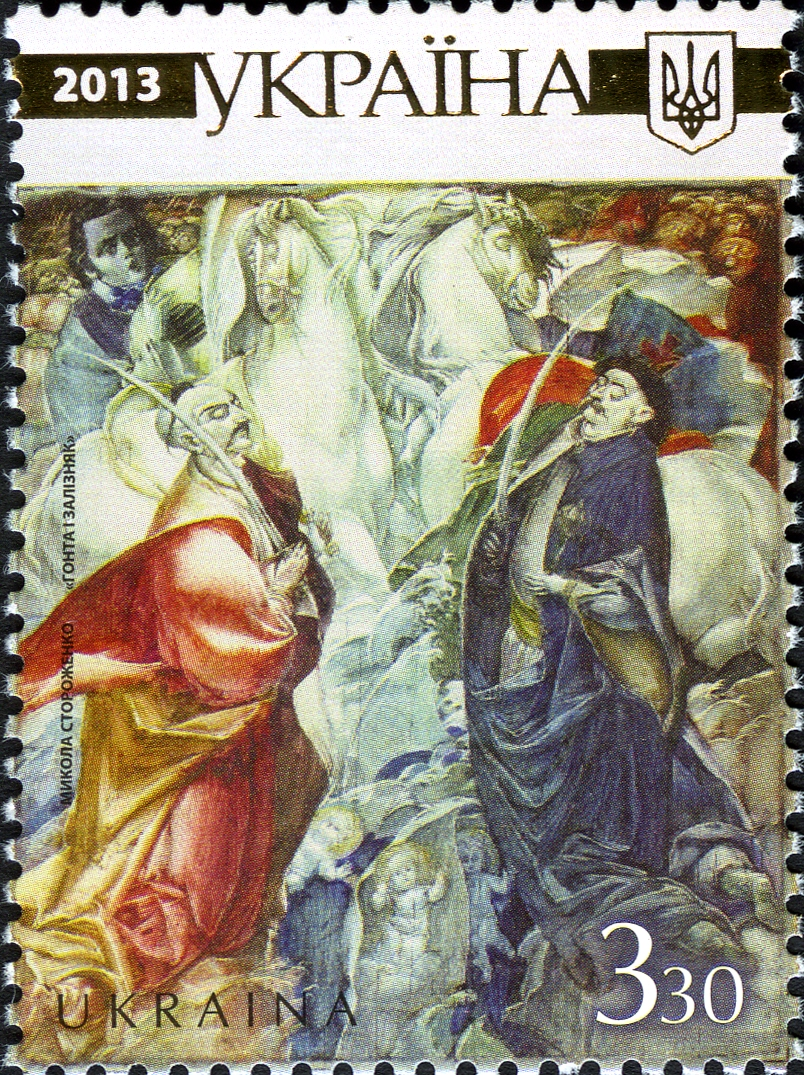 Марка № 1273 «Микола Стороженко «Гонта і Залізняк».